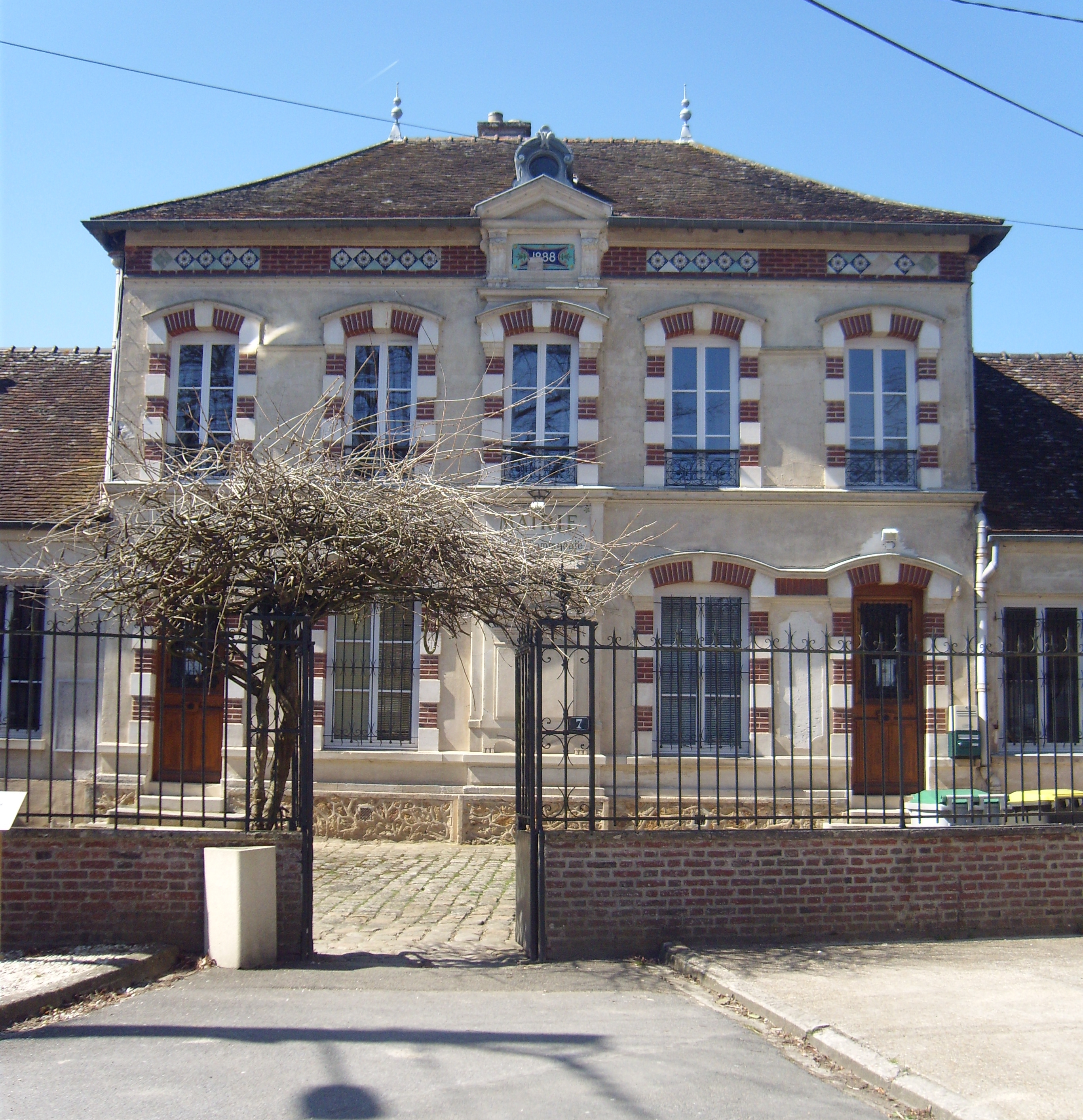 Mairie de Crèvecœur-en-Brie